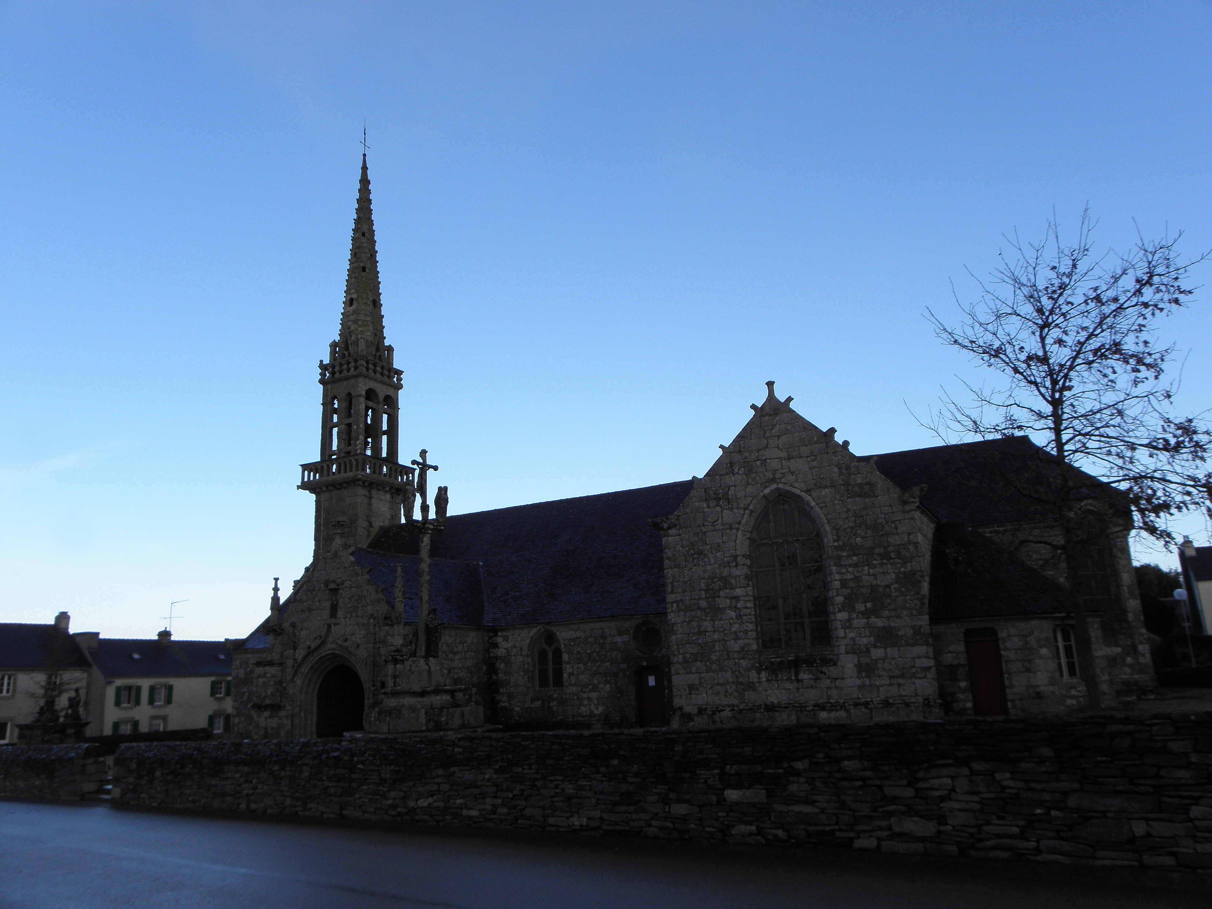 Église Saint-Jérôme de Cast (29).